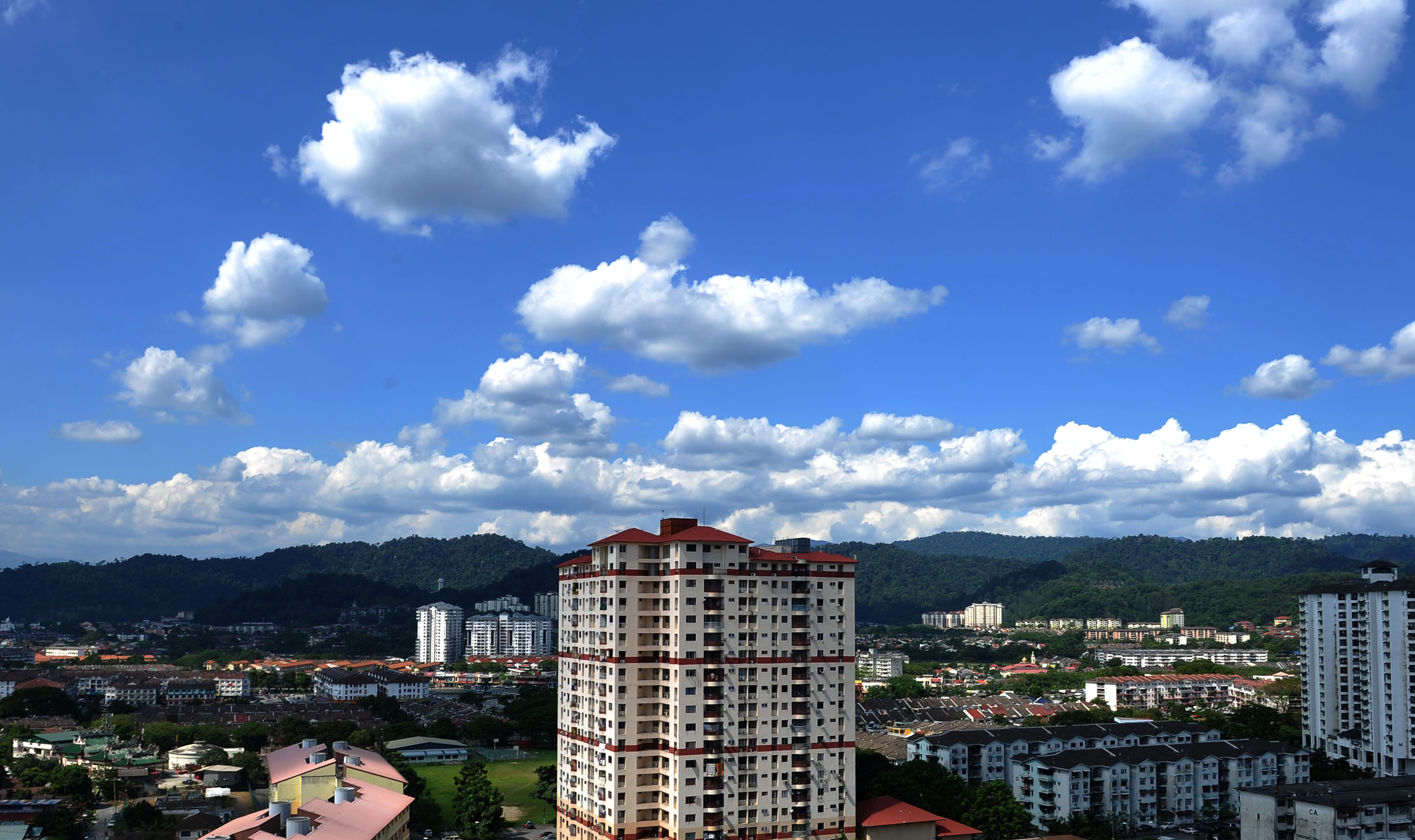 Ampang nice day View